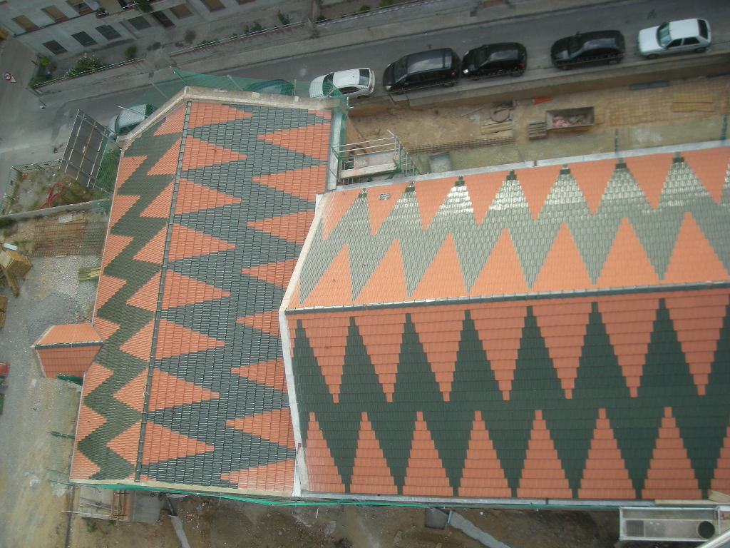 Teulada del Celler Cooperatiu de Rubí